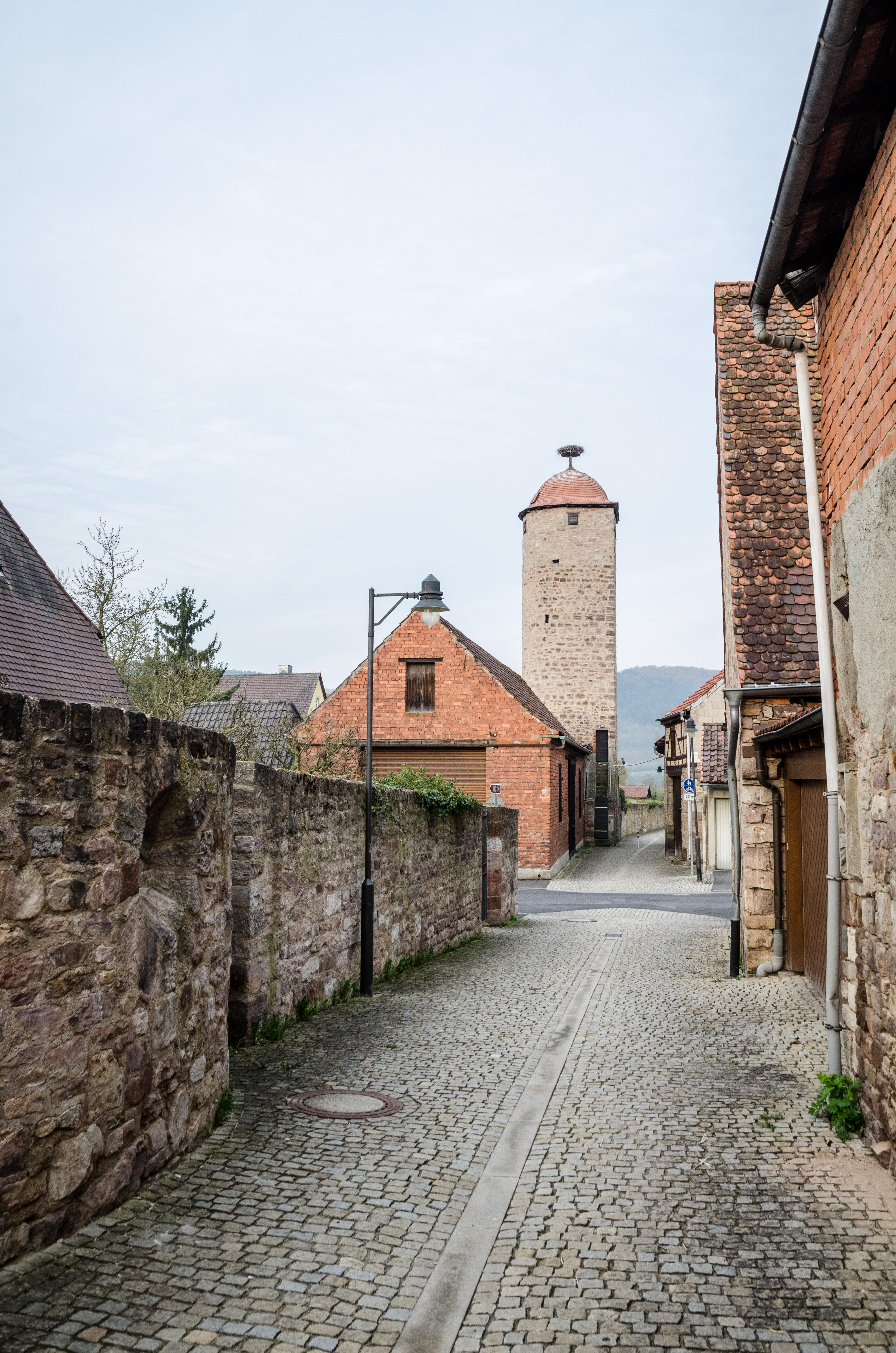 Hammelburg, Obere Stadtmauer